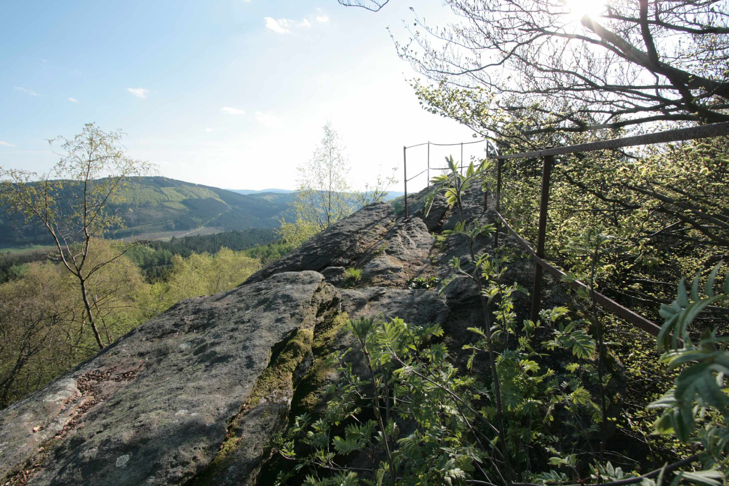 Rinsleyfelsen bei Saalhausen, Lennestadt; Blick in die Umgebung